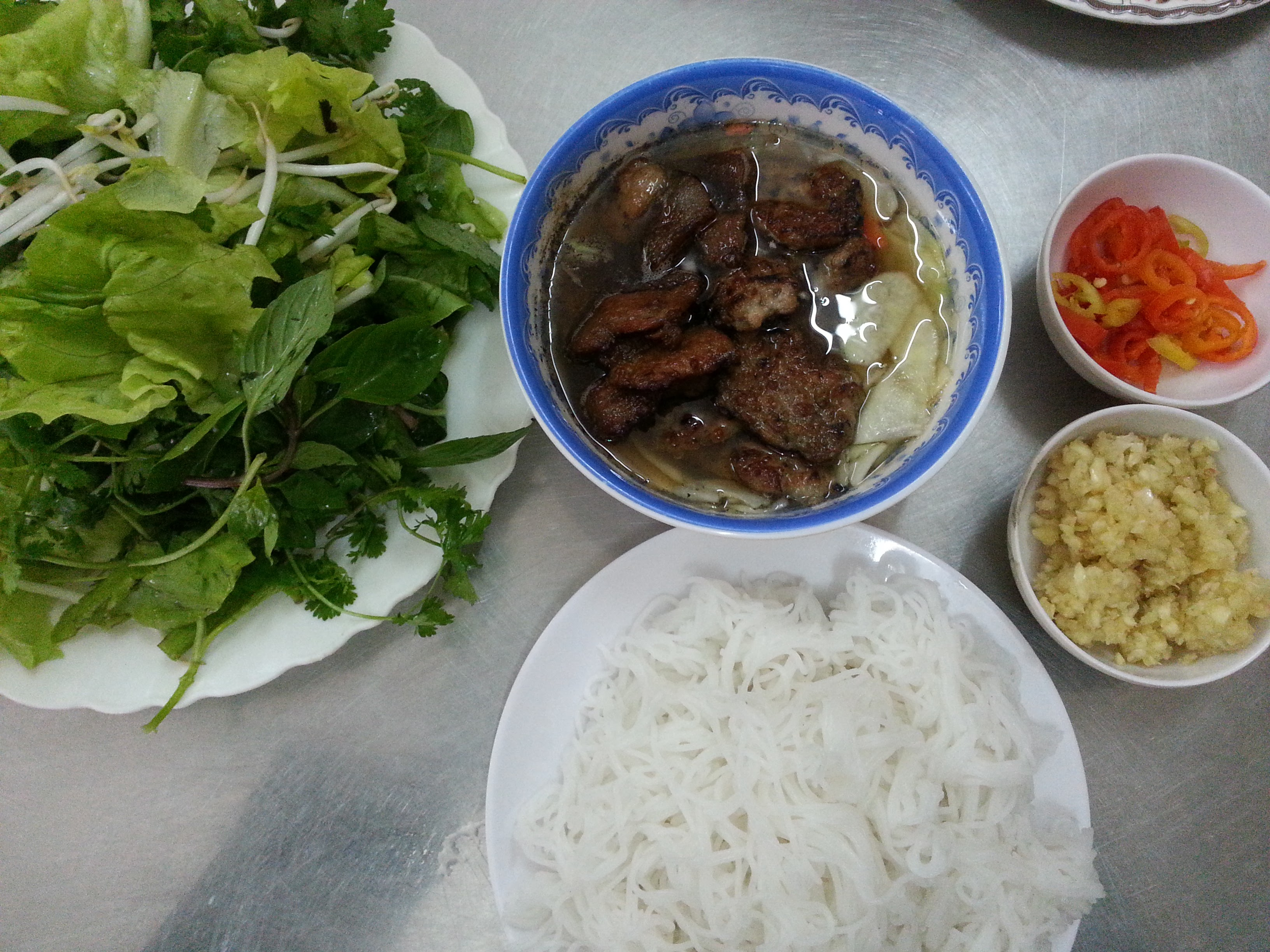 Bún chả Thụy Khuê (Thuy Khue street, Ba Dinh district, Hanoi, Vietnam)